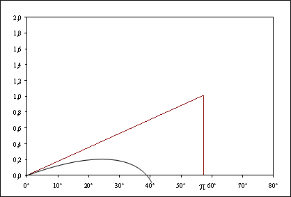 Eigen ontwerp.